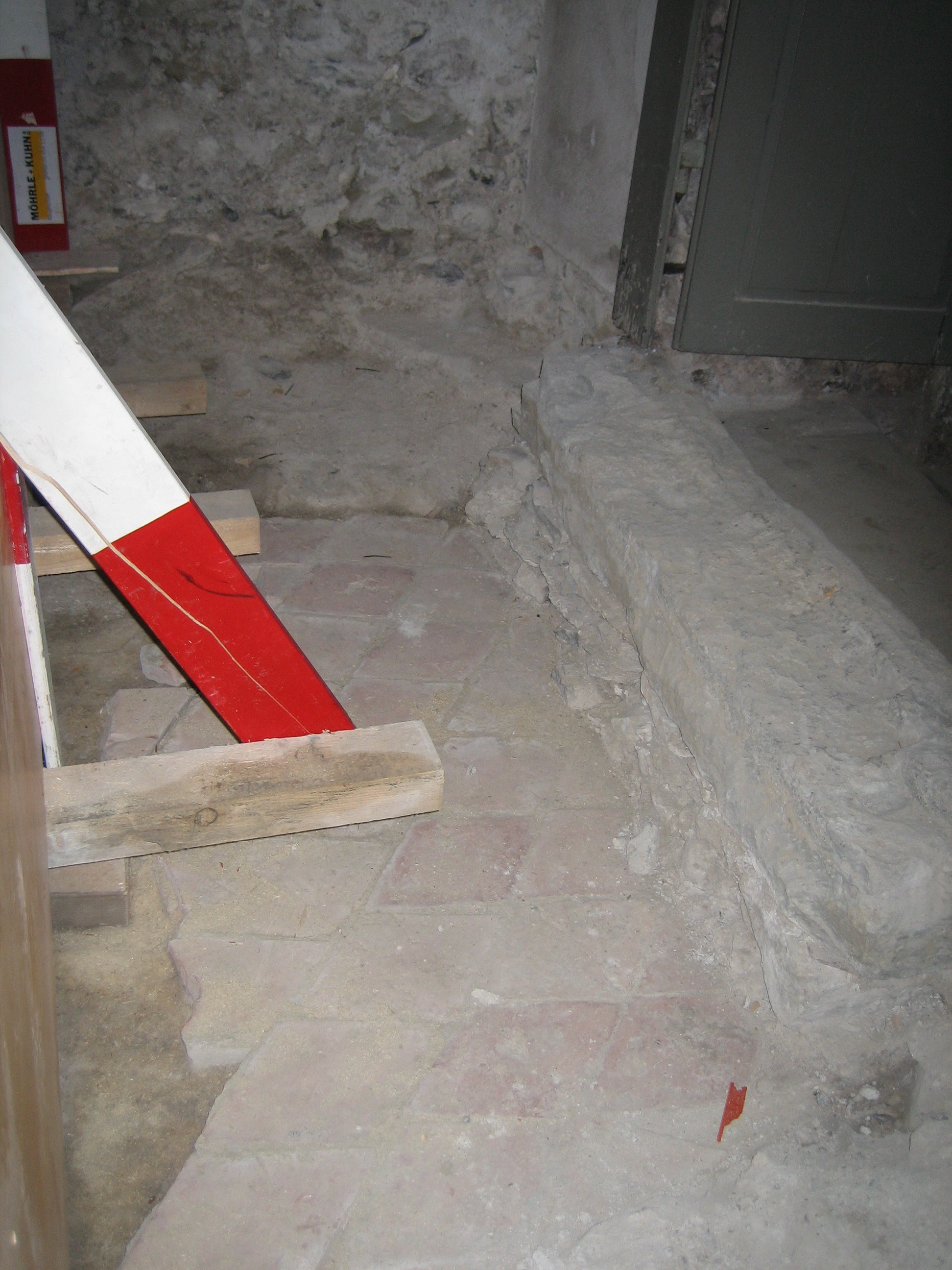 Freigelegter alter Boden (Kirche? Chor?)